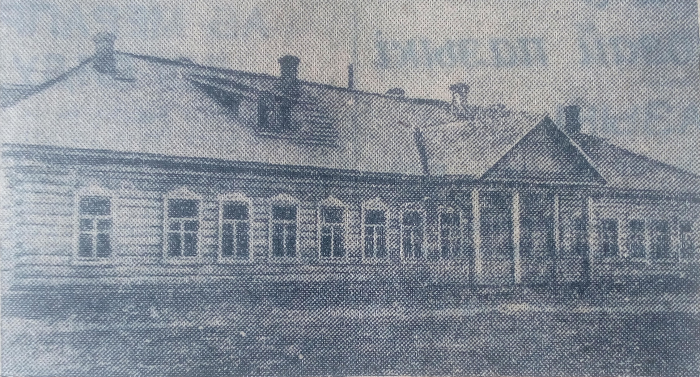 Беларуская (тарашкевіца): Татарка (Tatarka). Інтэрнат для работнікаў